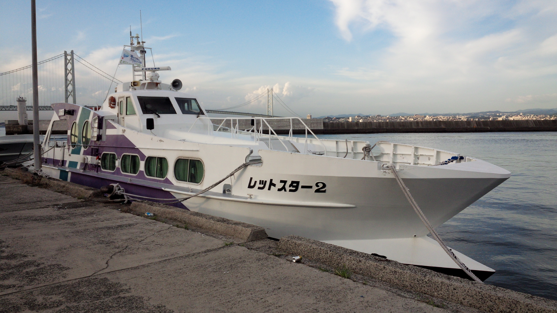 淡路ジェノバラインの小型船「レットスター２」